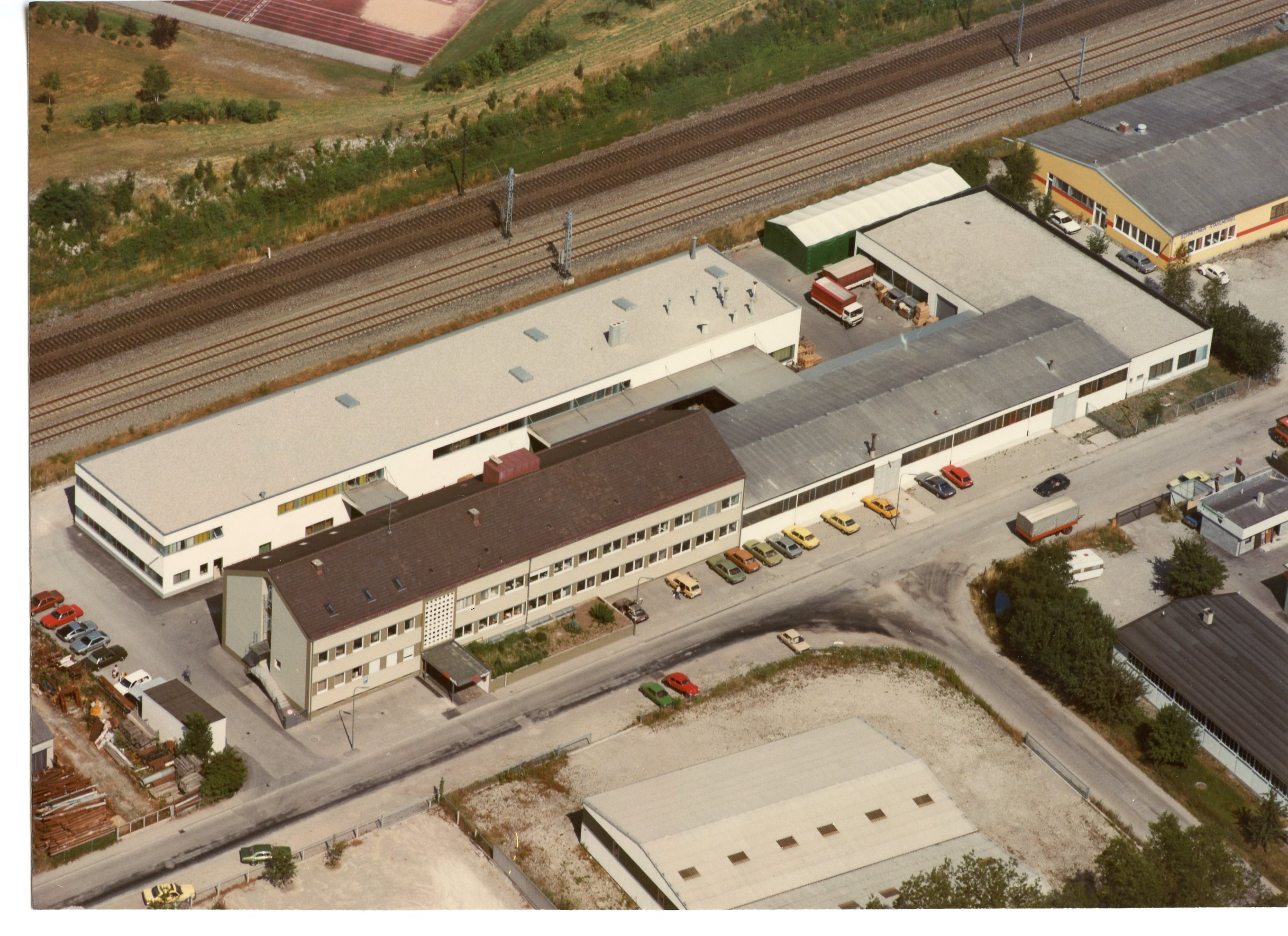 Luftaufnahme ritterwerk Gröbenzell aus dem Jahr 1982